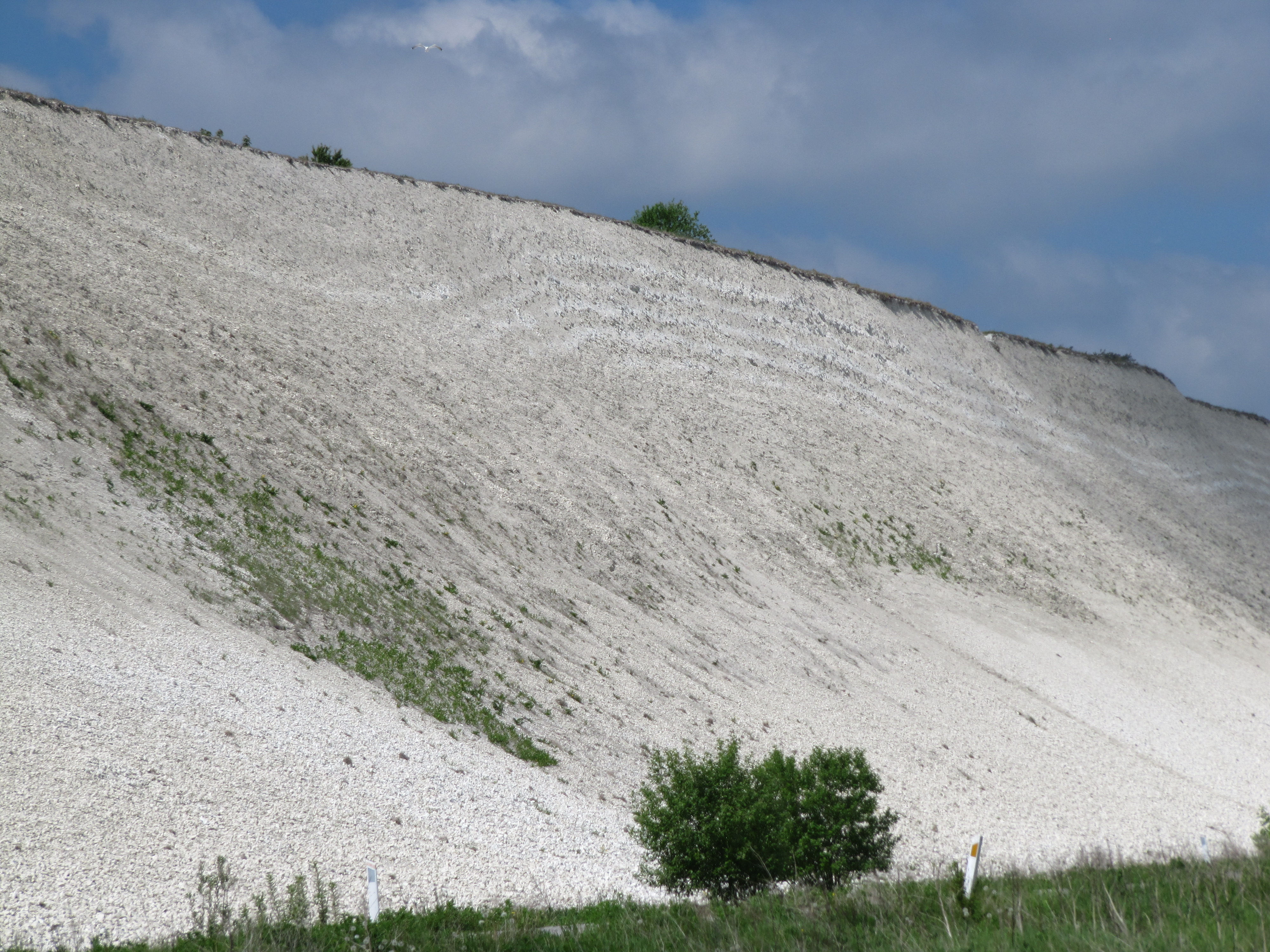 Rytmisk aflejret skrivekridt i Rørdal kridtgrav